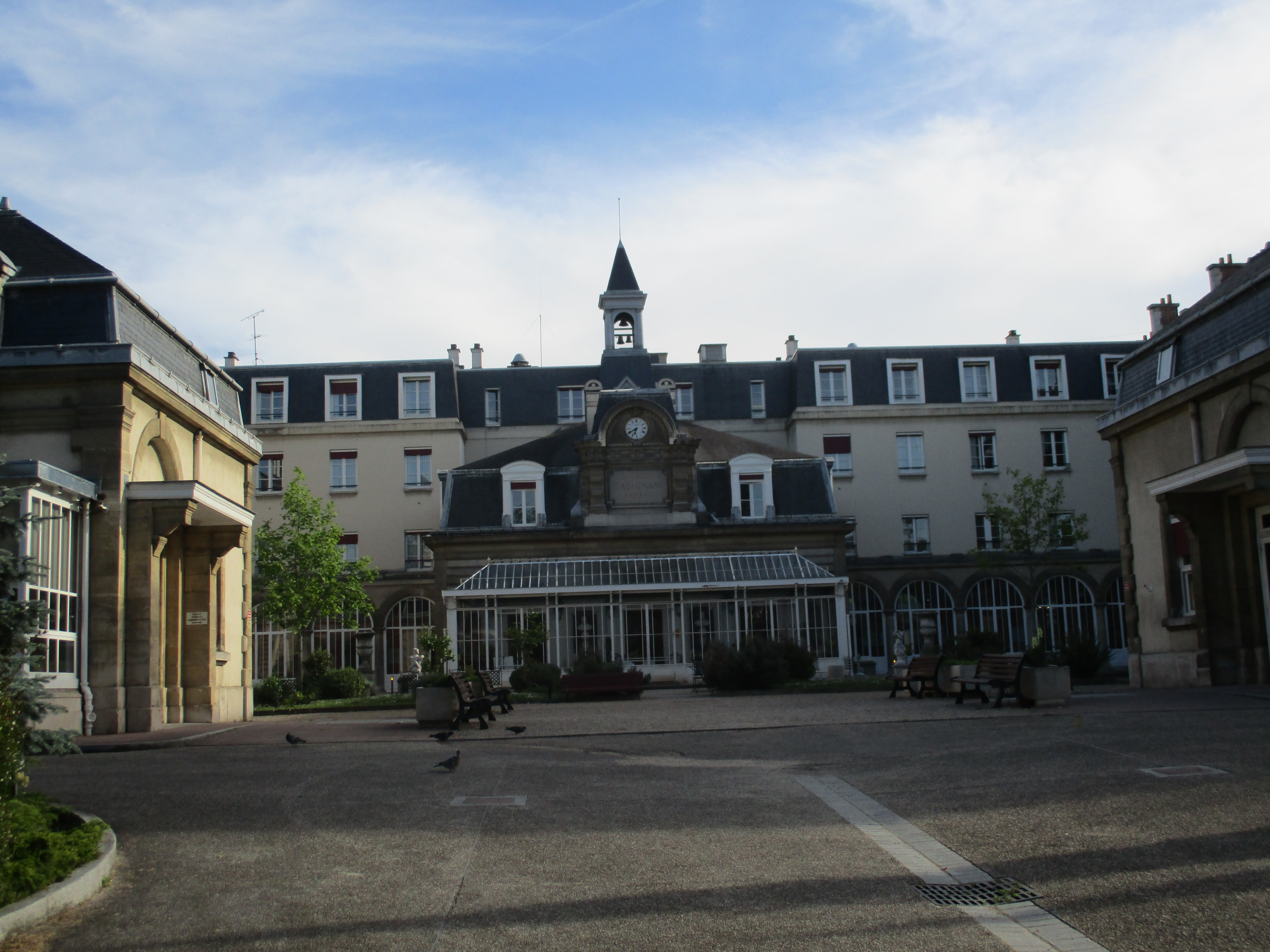 Résidence Galignani, maison de retraite à Neuilly-sur-Seine.